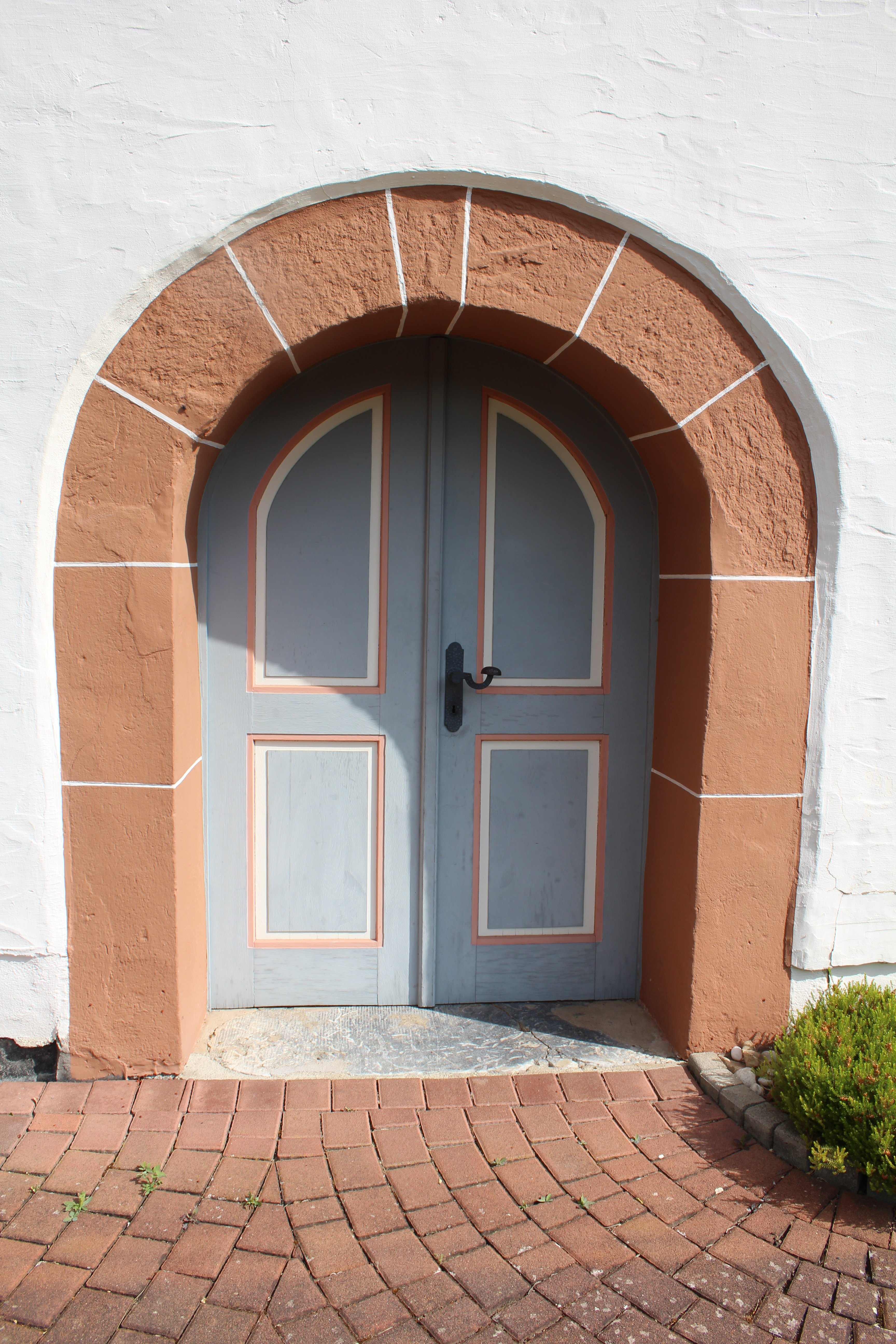 Ev. Kirche Nauborn, Wetzlar, Lahn-Dill-Kreis, Hessen, Deutschland